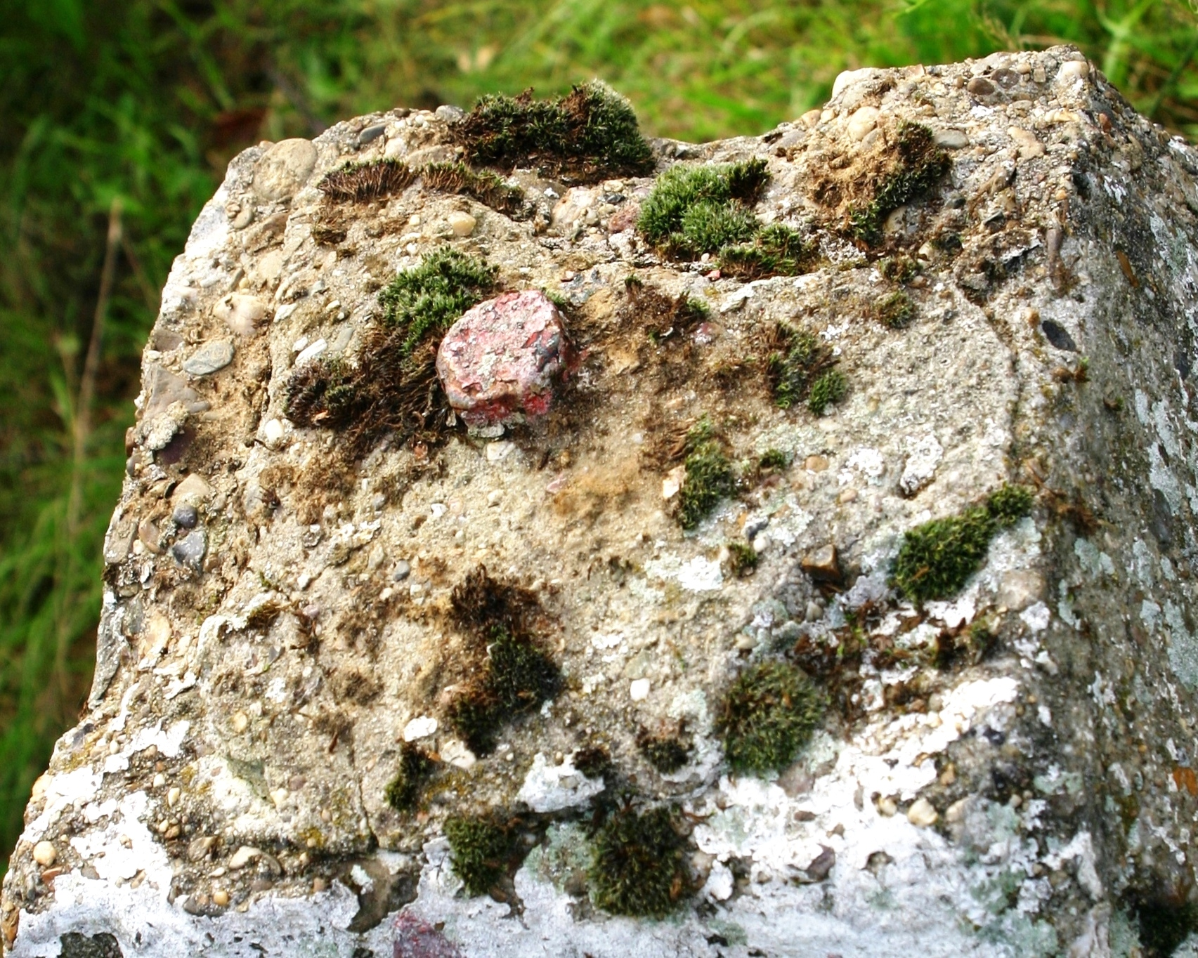 Kapp vun der Maark zu Vucht mat dem geneeë Vermiessungspunkt. Kategorie:Maarken